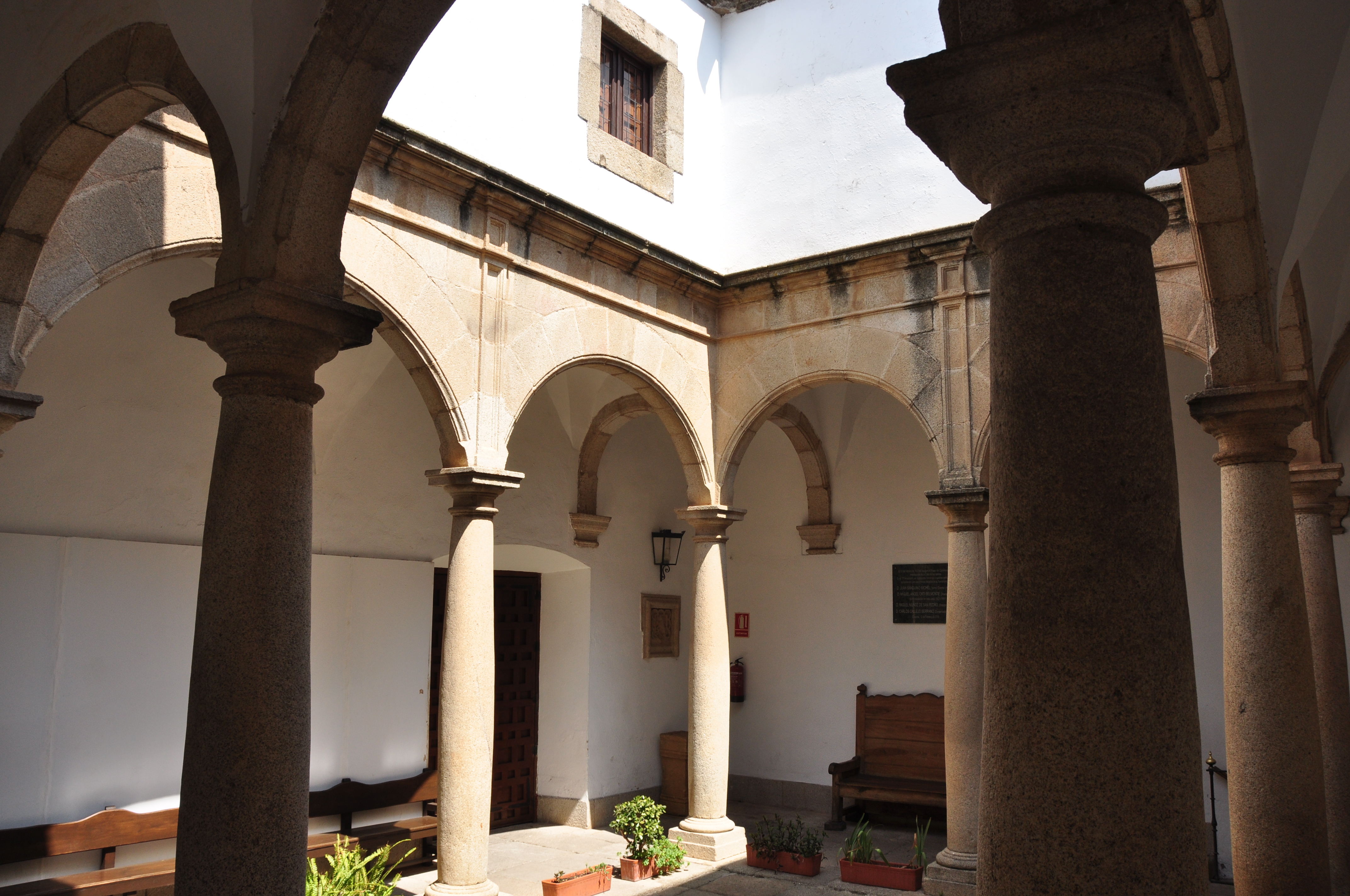 Patio del Palacio de las Veletas, sede del Museo Provincial de Cáceres.